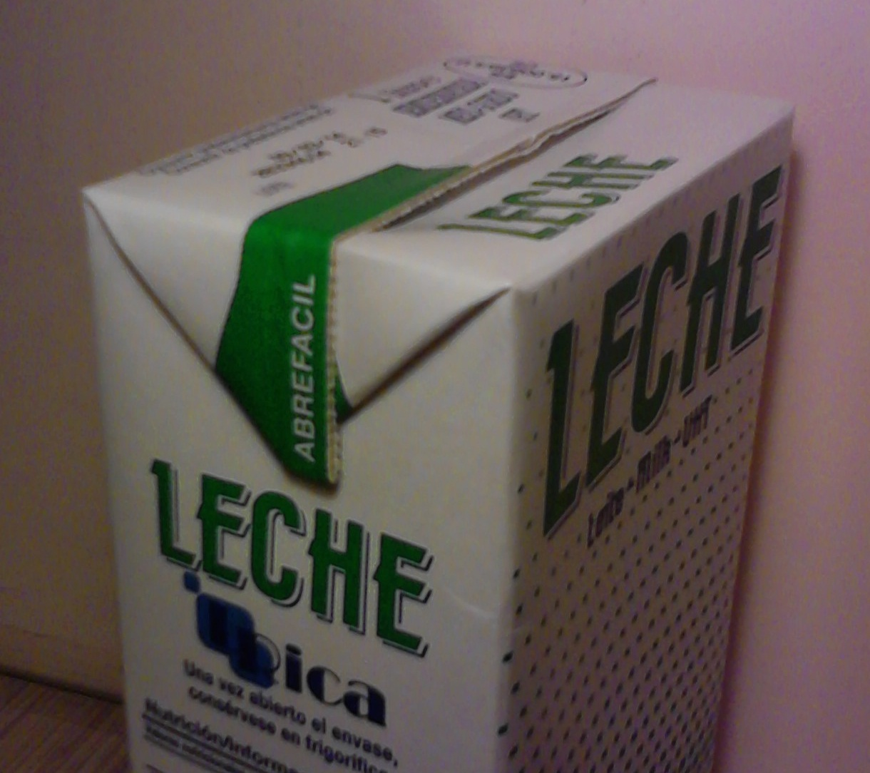 Fotografía propia del dispositivo de apertura conocido como Abre fácil, en un tetra brik de leche.